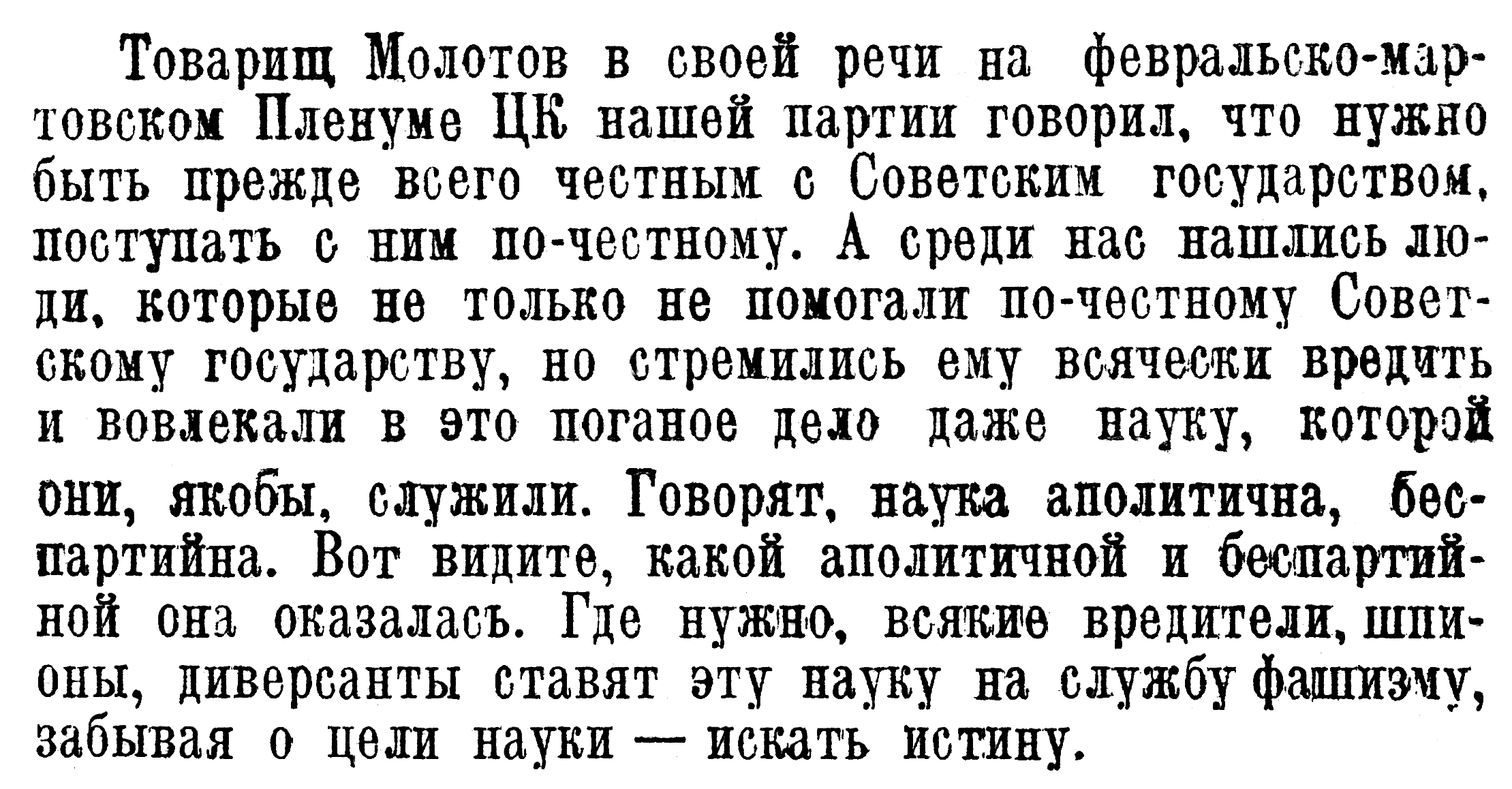 Цитата из статьи на стр. 19-20: Губкин И. М. Задачи нефтяной геологии в третьей пятилетке: Сокращённый доклад на 1 геологической конференции Азербайджанской СССР 7-9 декабря 1937 года // Азербайджанское нефтяное хозяйство. 1939. № 1. С. 16-23. (оригинальная орфография сохранена)